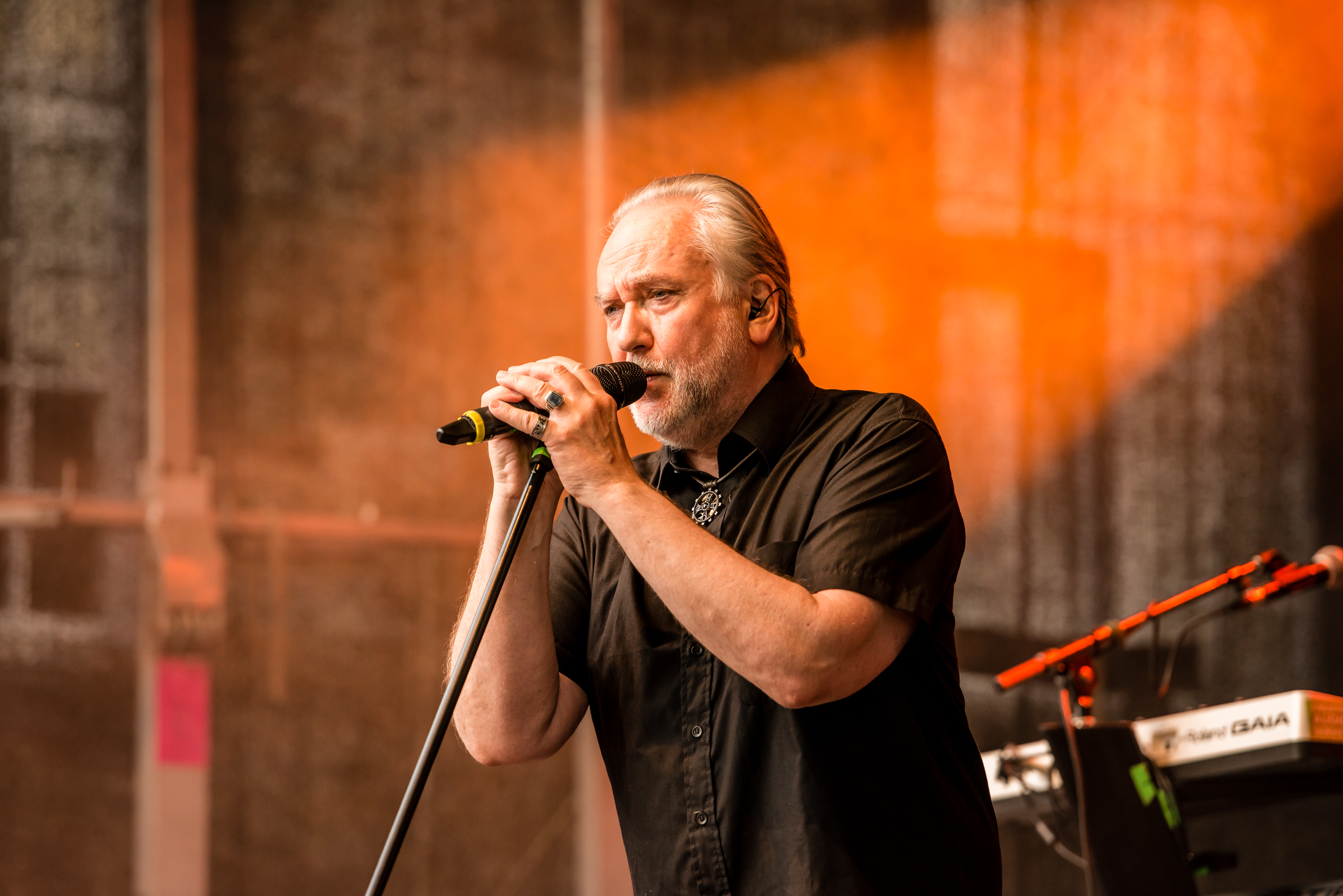 'Castle Rock 2015; Mülheim Schloß Broich': 'Joachim Witt'